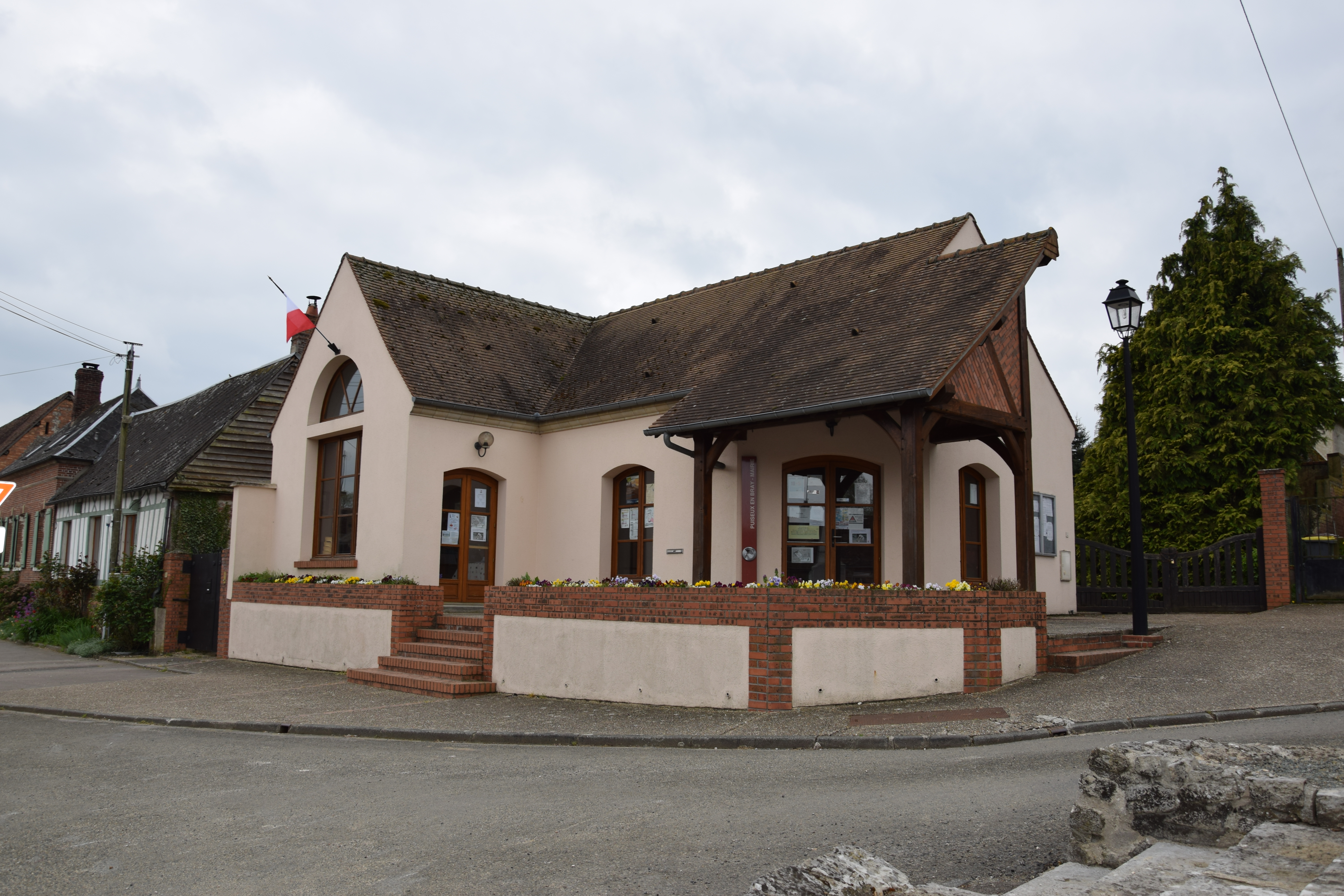 Puiseux-en-Bray